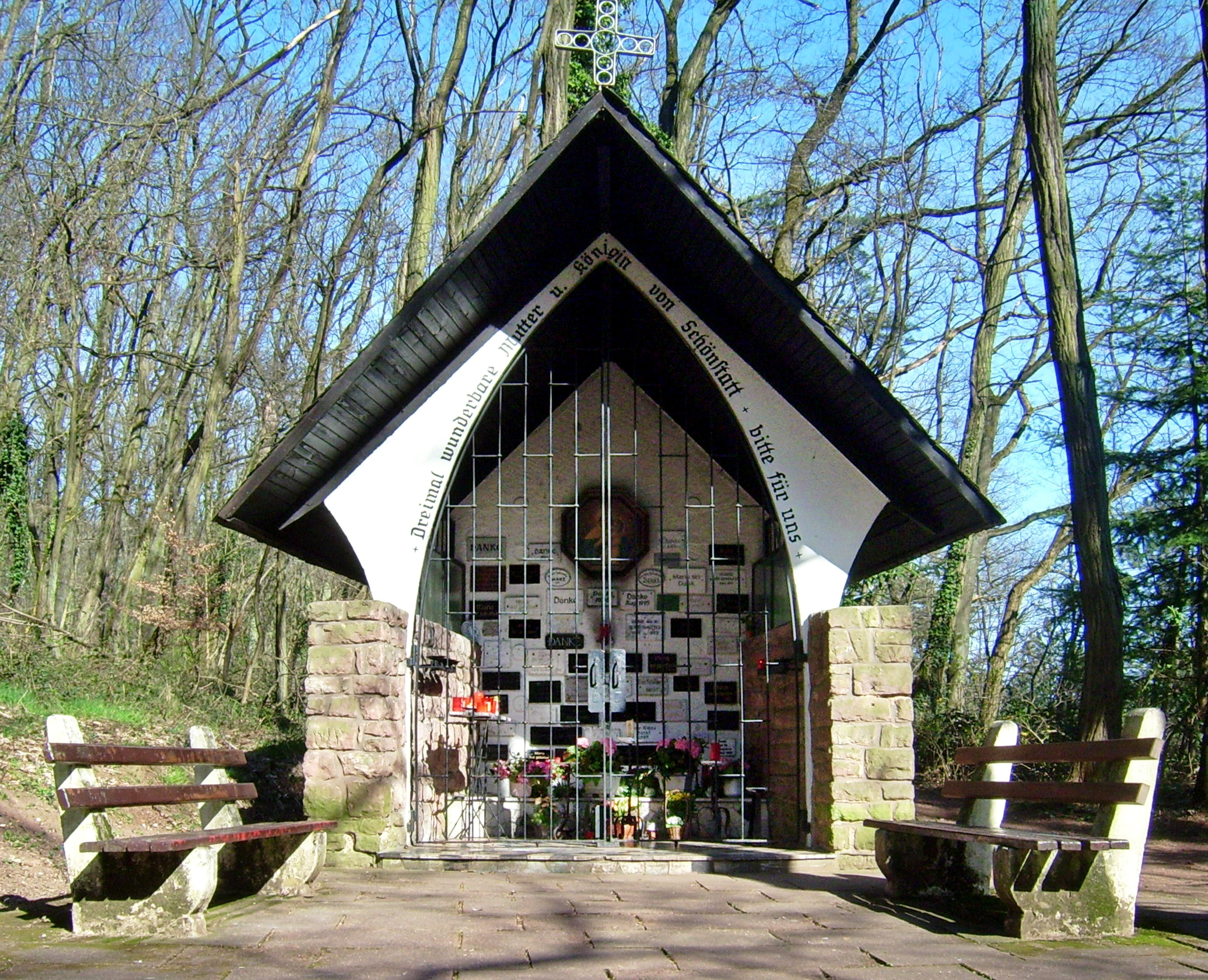 Kapelle in Dillingen